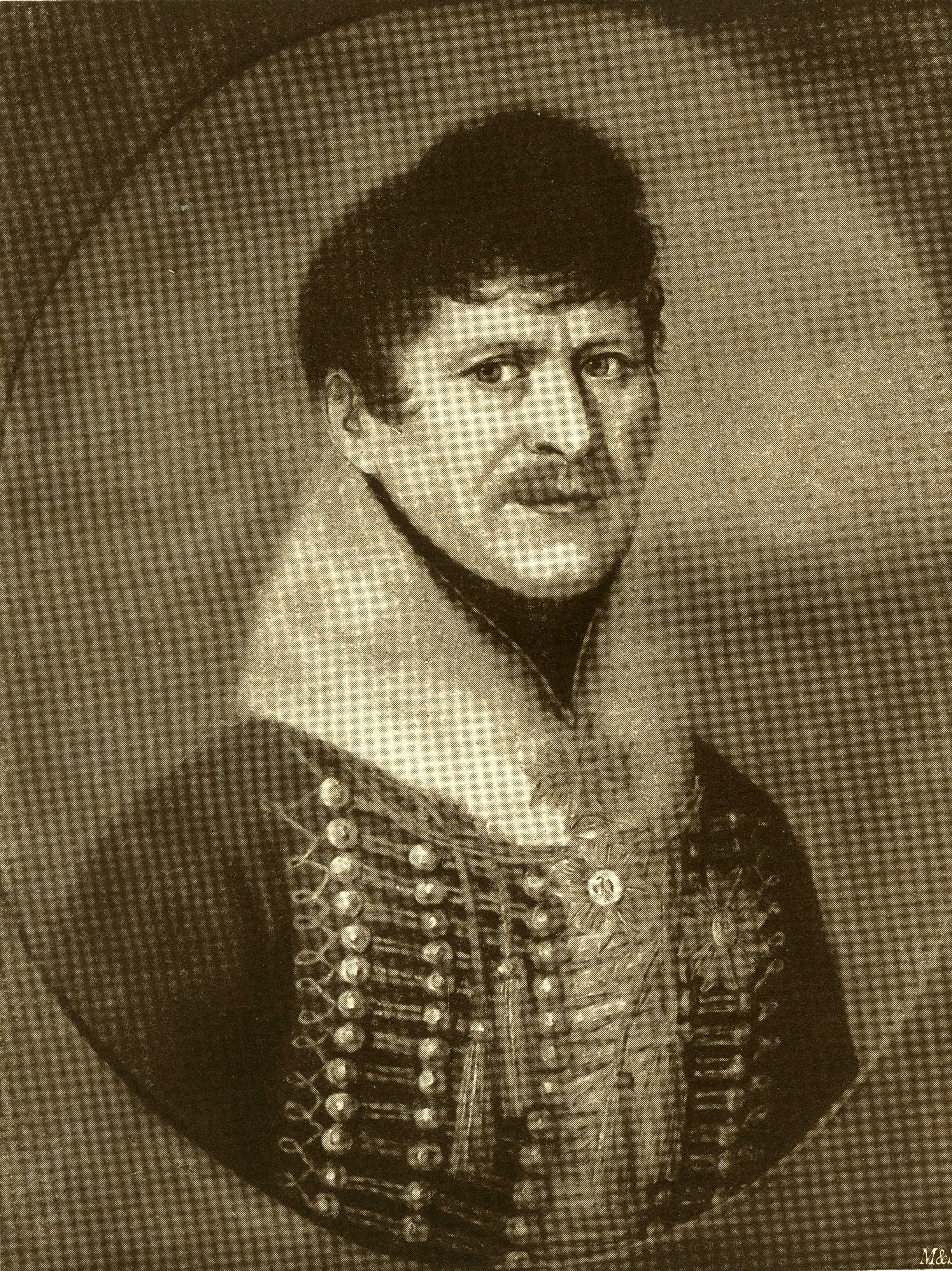 Friedrich von Eisenhart als Rittmeister nach einem zeitgenössischem Pastell